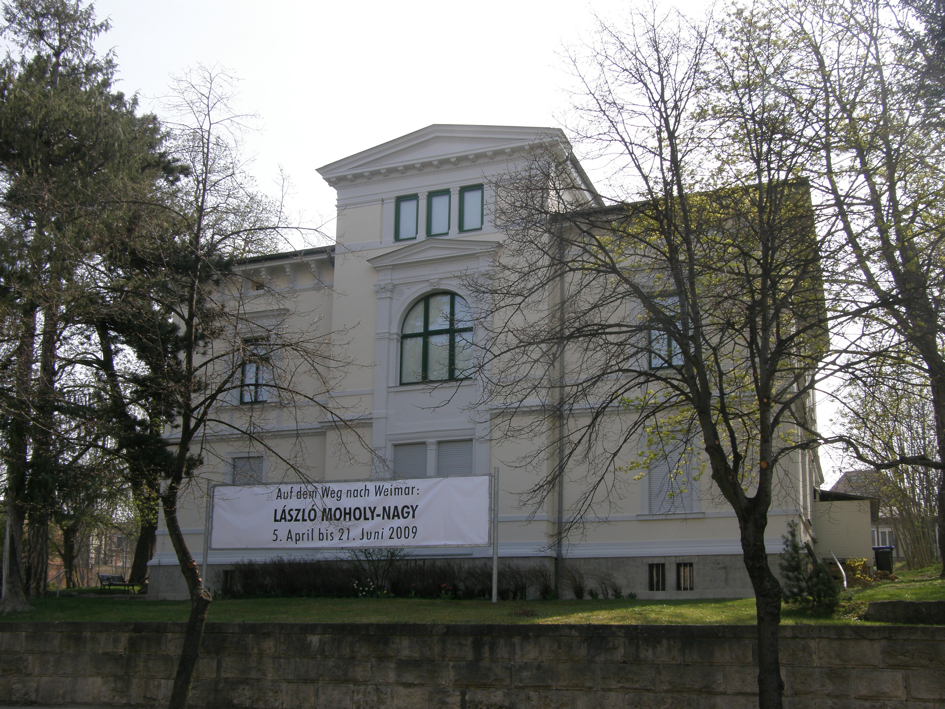 Stadt Apolda - Kunsthaus Apolda Avantgarde